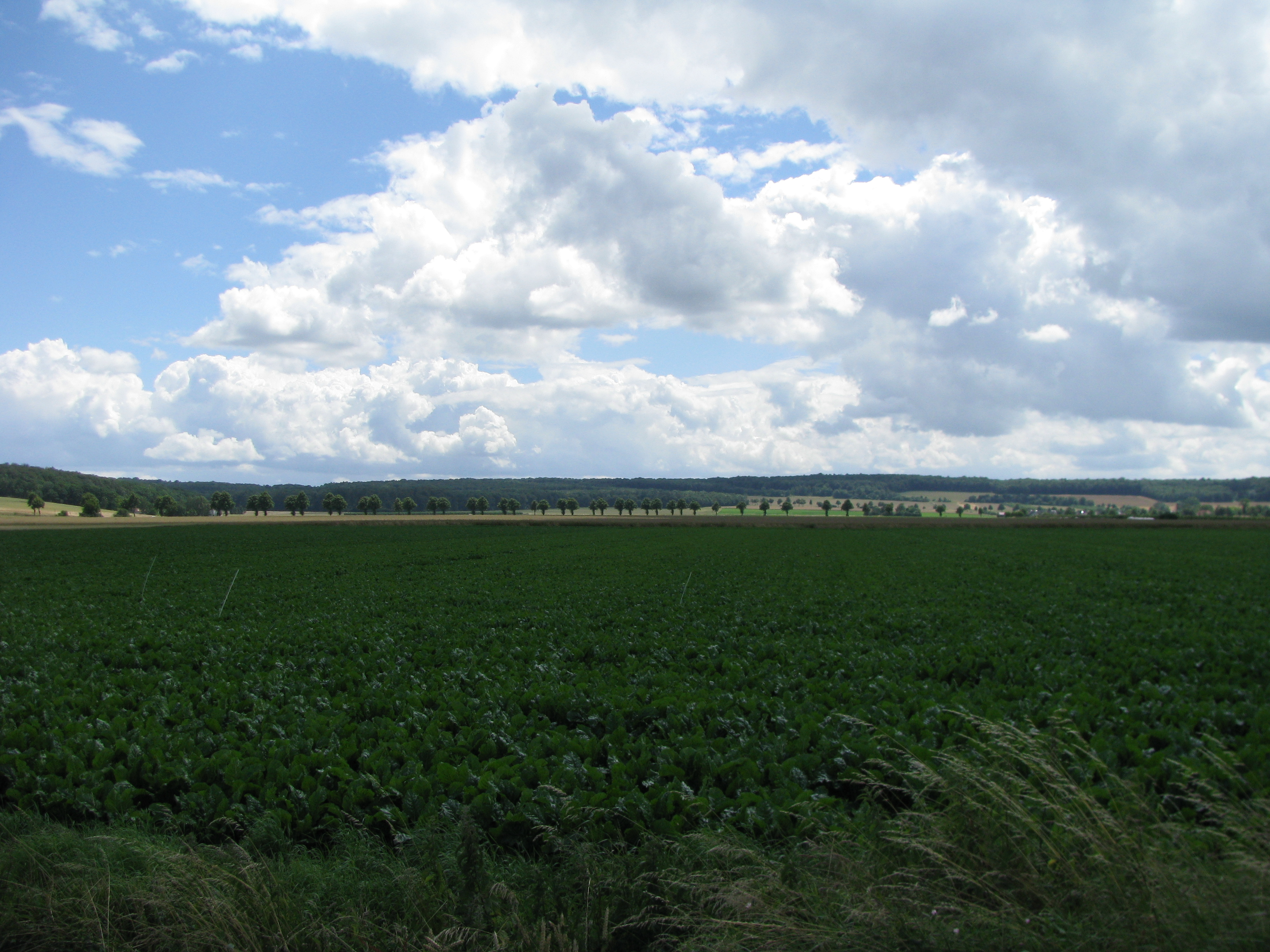 der Langer Berg von nordwesten